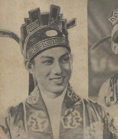 嘻笑怒骂鬚眉毕现:侯方域,白云饰，《金星特刊》，1940 年 [ 第1期 ，1页 ]